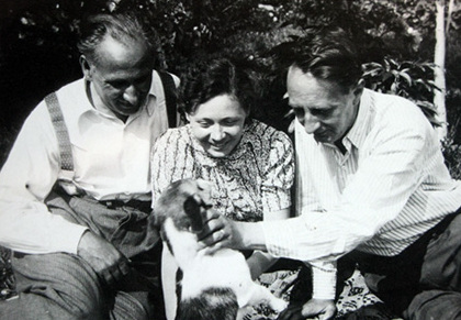 Вацлав Капралов, Витезлава Капралова и Богуслав Мартину